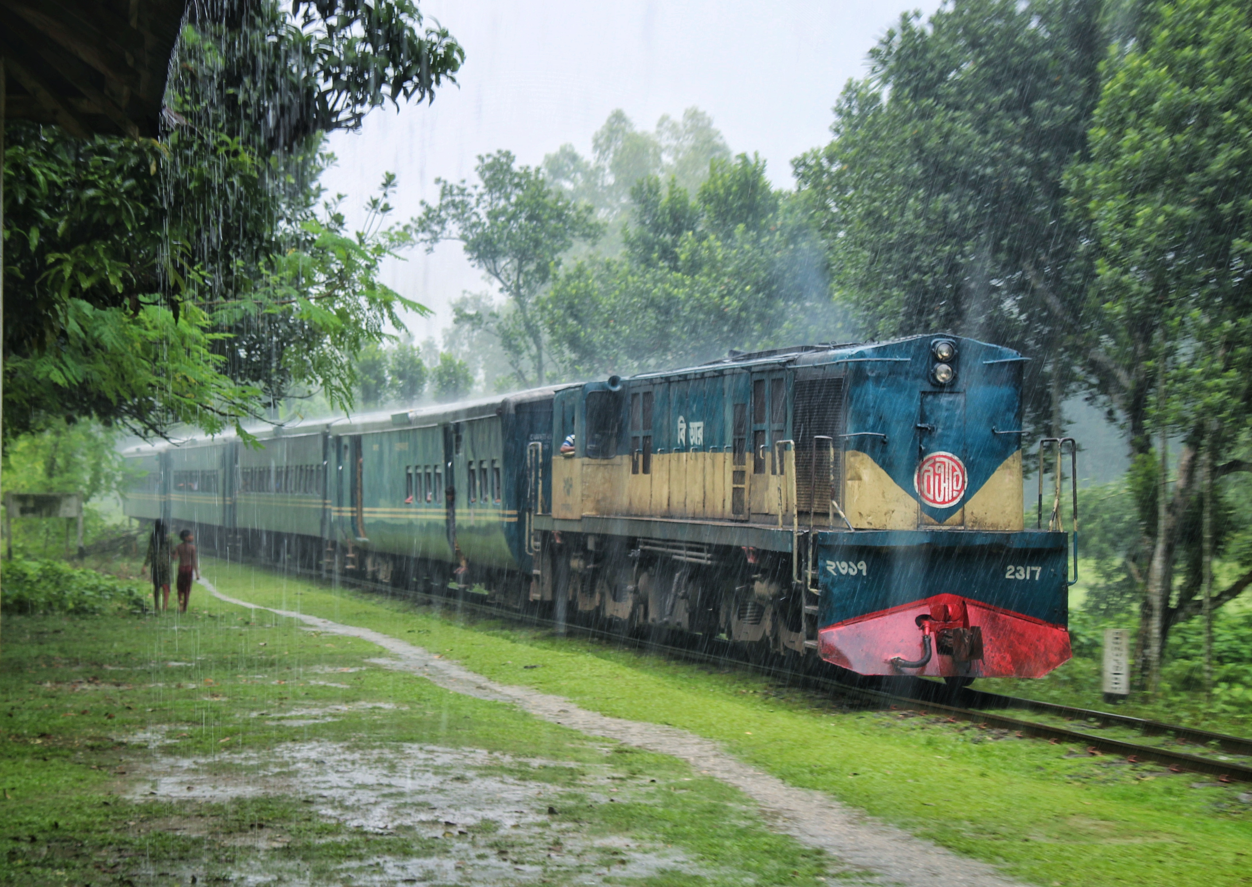 বৃষ্টিকে মাথায় নিয়ে অপরূপ প্রকৃতির মাঝে ছুটে চলা বাংলাদেশ রেলওয়ের ট্রেন।